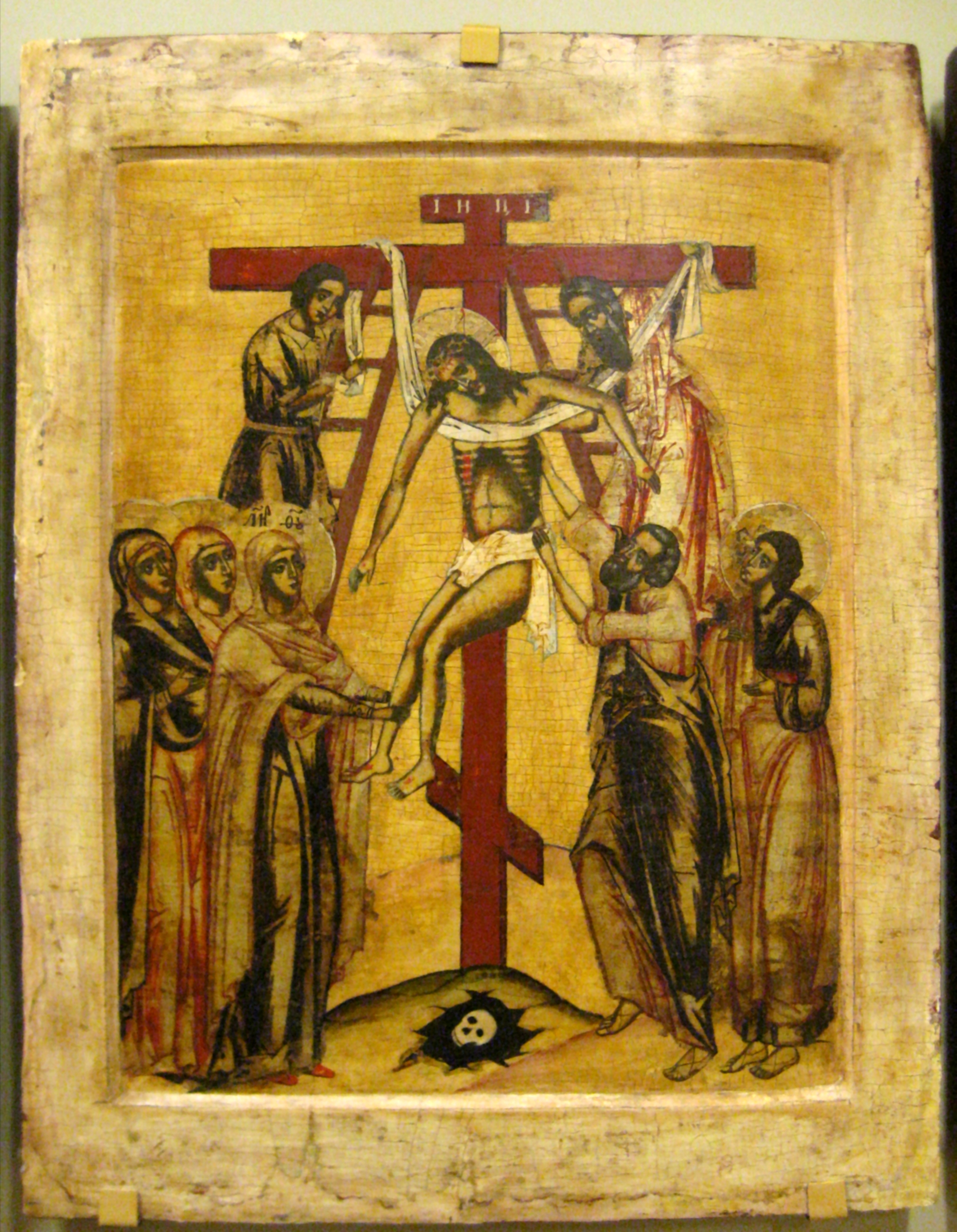 Снятие с креста. Праздничный чин. Костромские земли. Конец 17 века - около 1700 года. Происхождение не установлено. Приобретена в Берне (Швейцария) в 2007 году